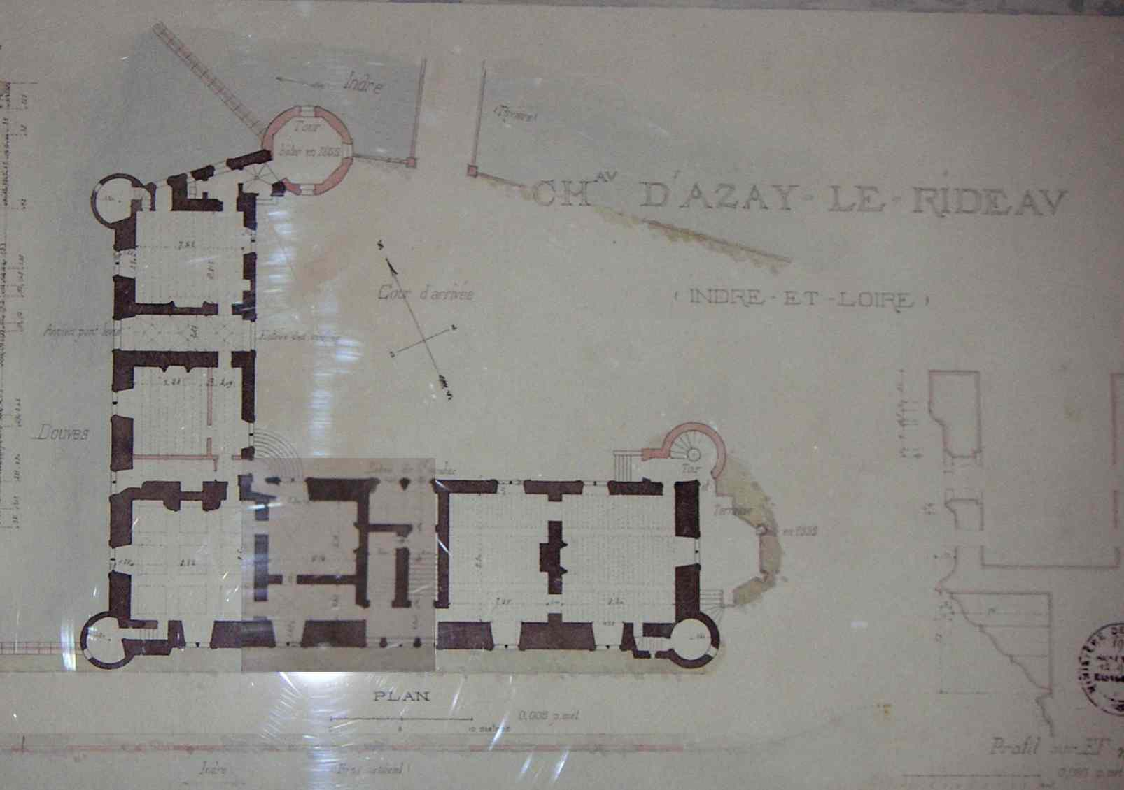 Plan du rez-de-chaussée du château d'Azay-le-rideau